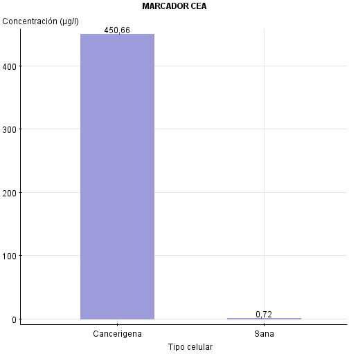 Comparación de la concentración del marcador tumoral CEA en células cancerígenas y en células sanas.